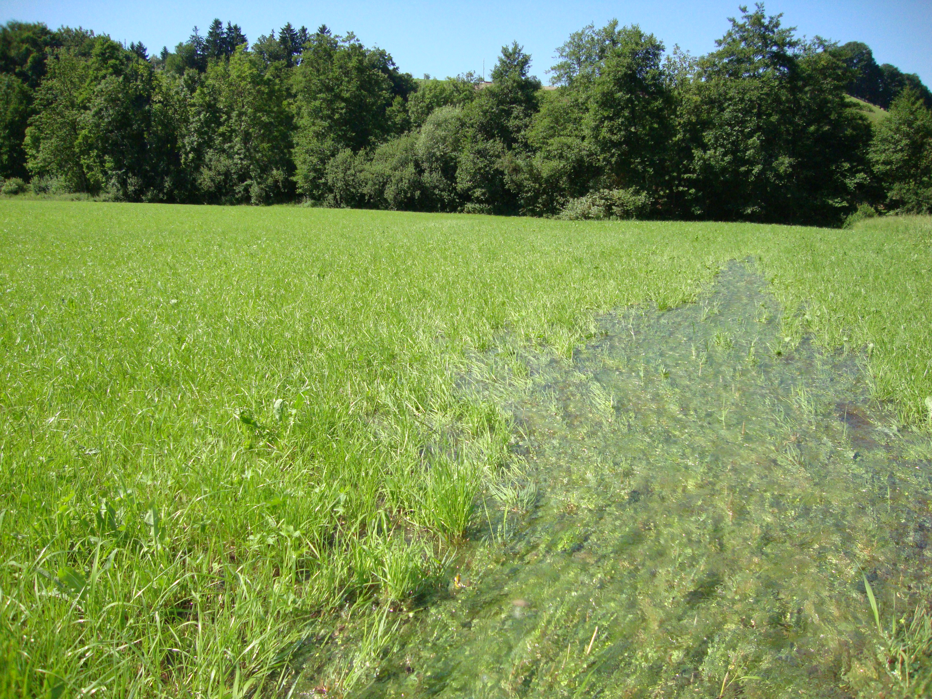 Wiesenbewässerung im Rottal (Schweiz)